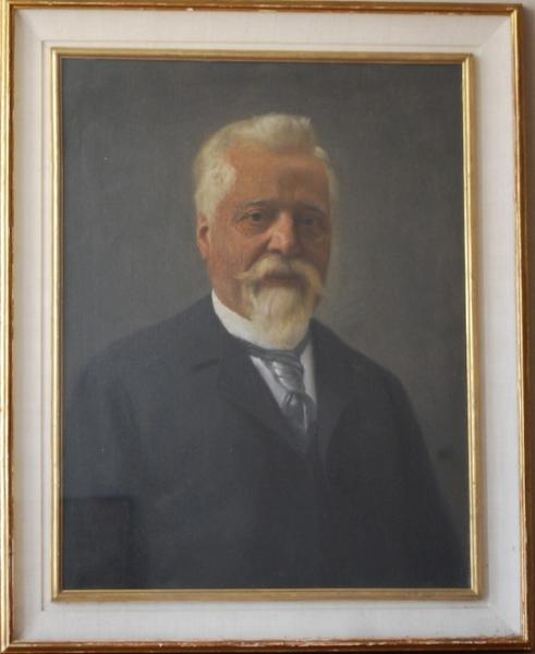 Fondatore della prima fabbrica di Armoniche, Armonium dell'Alto Adige